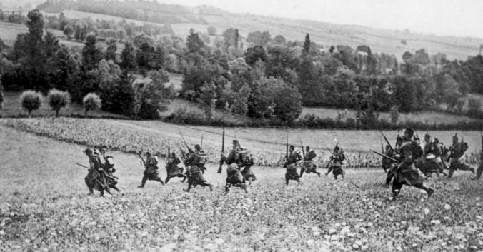 Fanteria francese all'assalto nel 1913 [1]